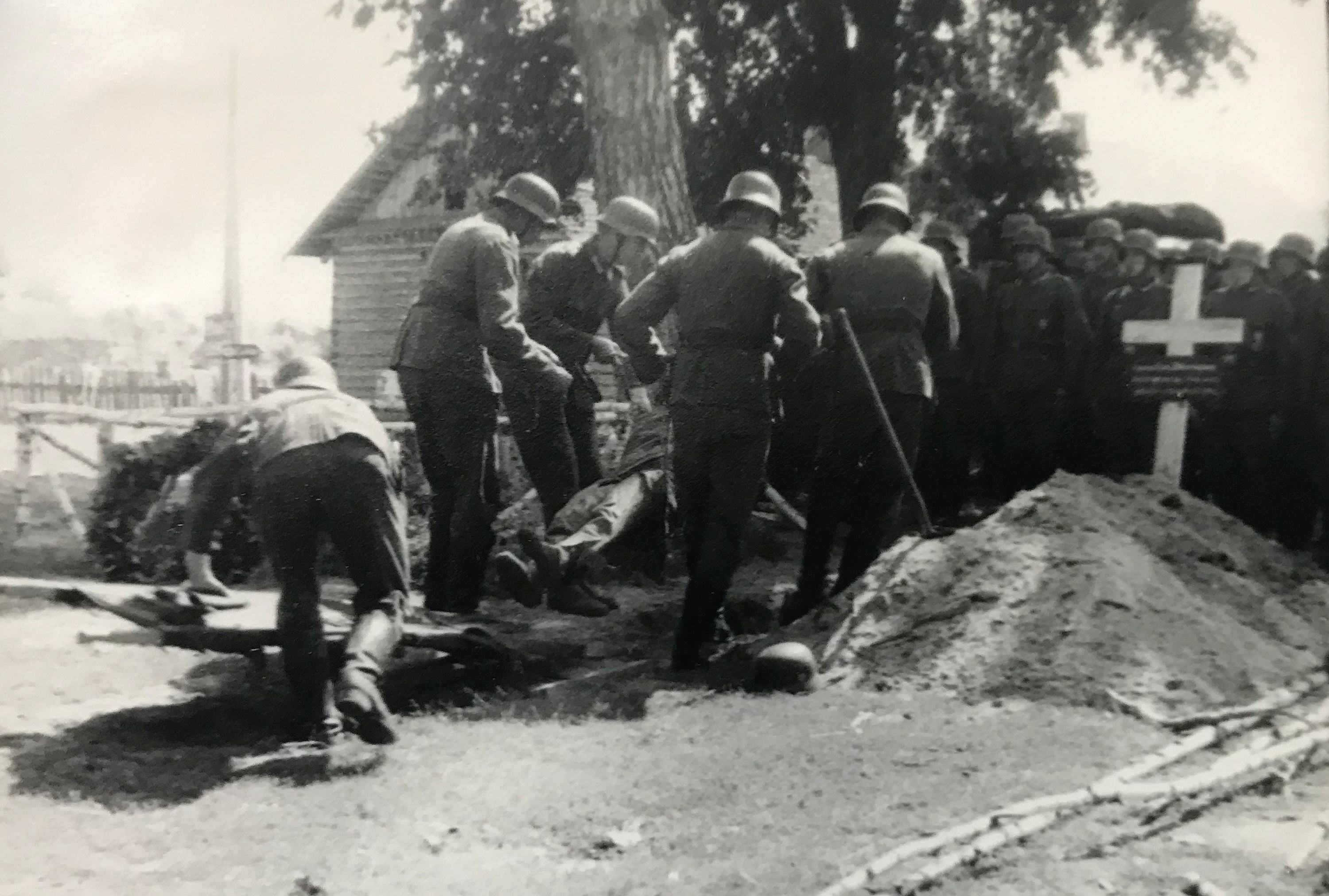 Deutscher Feldfriedhof (Sowjetunion). Beerdigung eines gefallenen Leutnants zw. 8.8. und 16.8.1941 bei "Schazilki"(??)